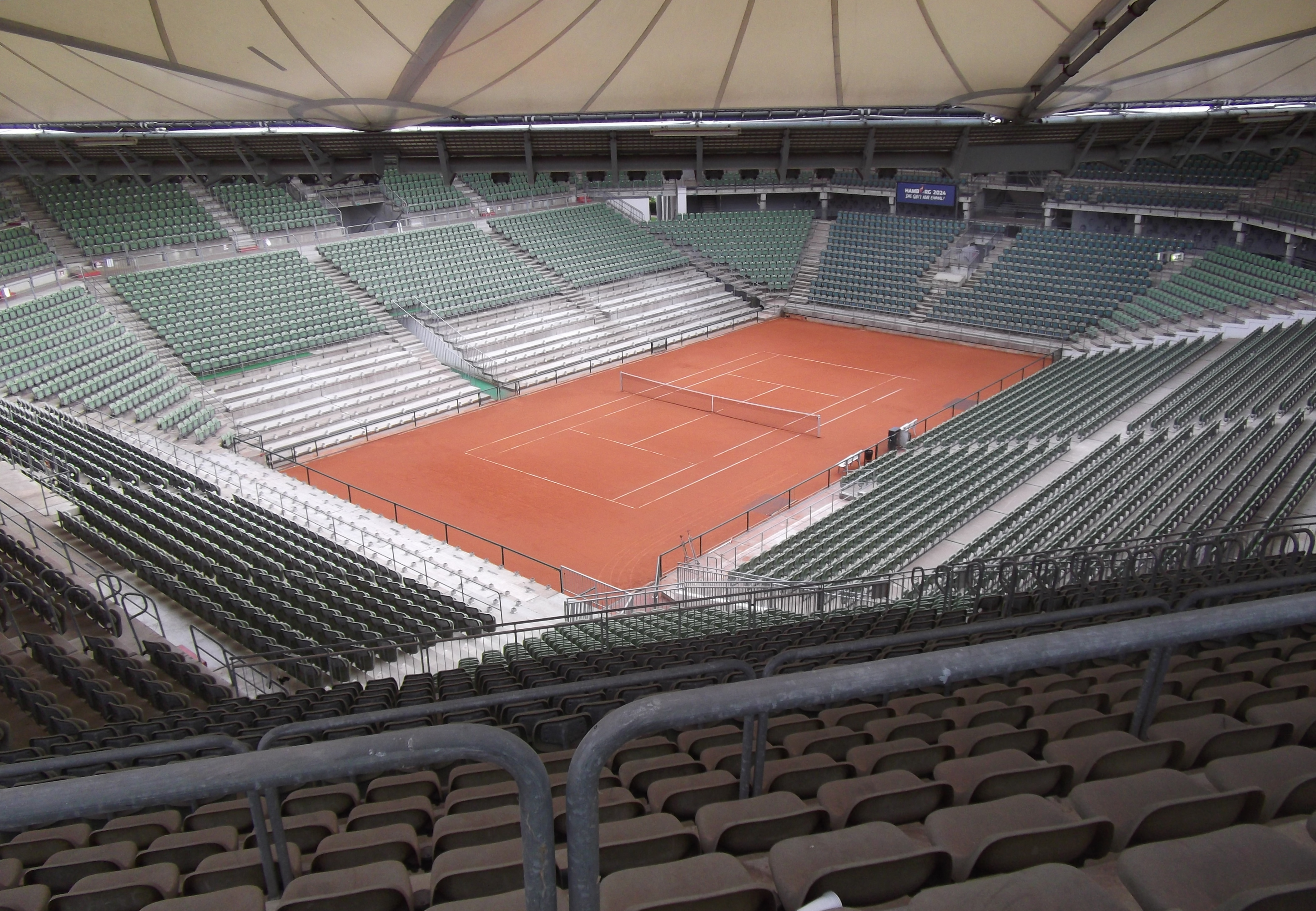 Hamburg, August 2015